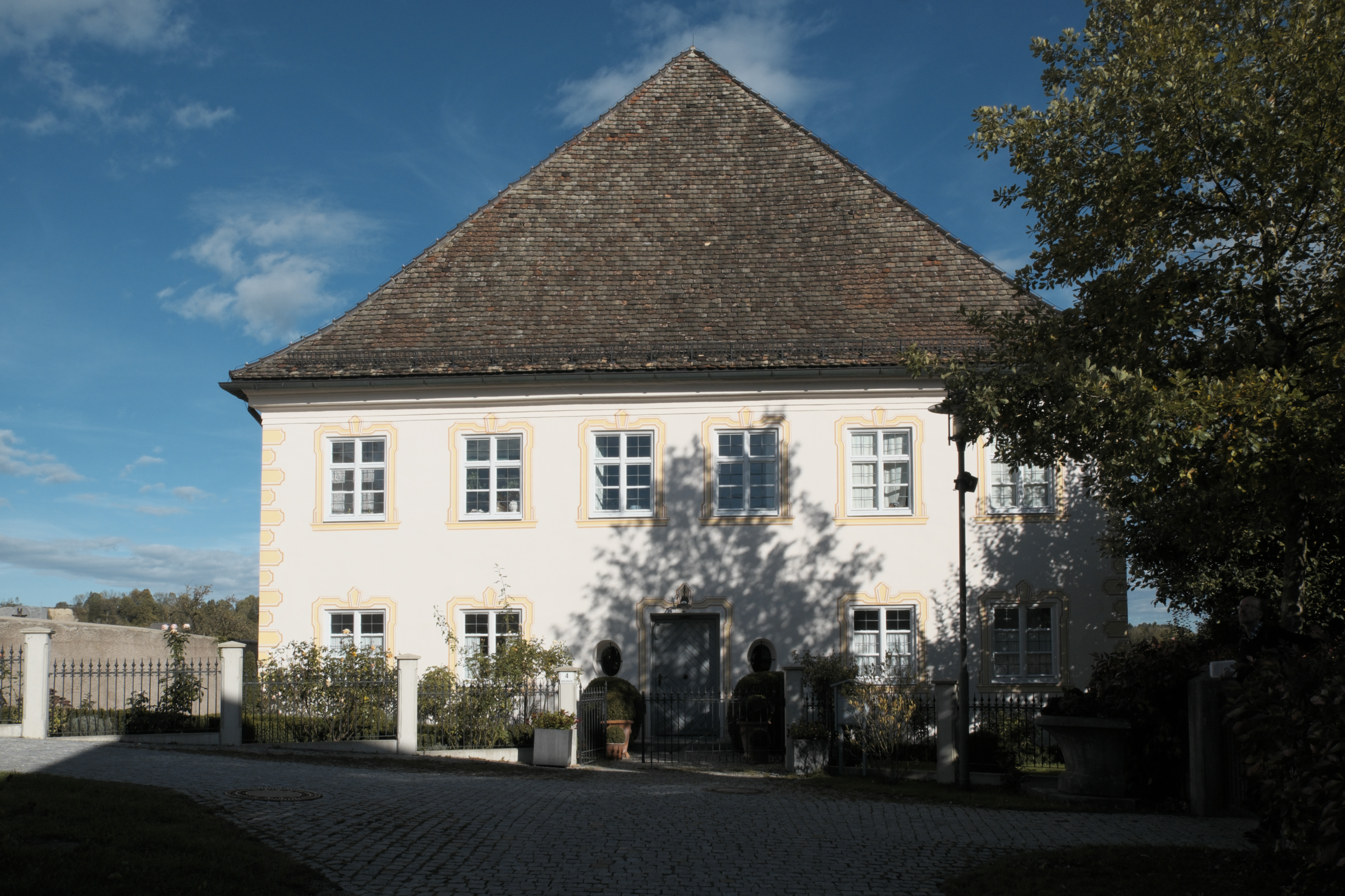 Pfarrhaus in Epfach (Denklingen) im Landkreis Landsberg am Lech (Bayern/Deutschland)